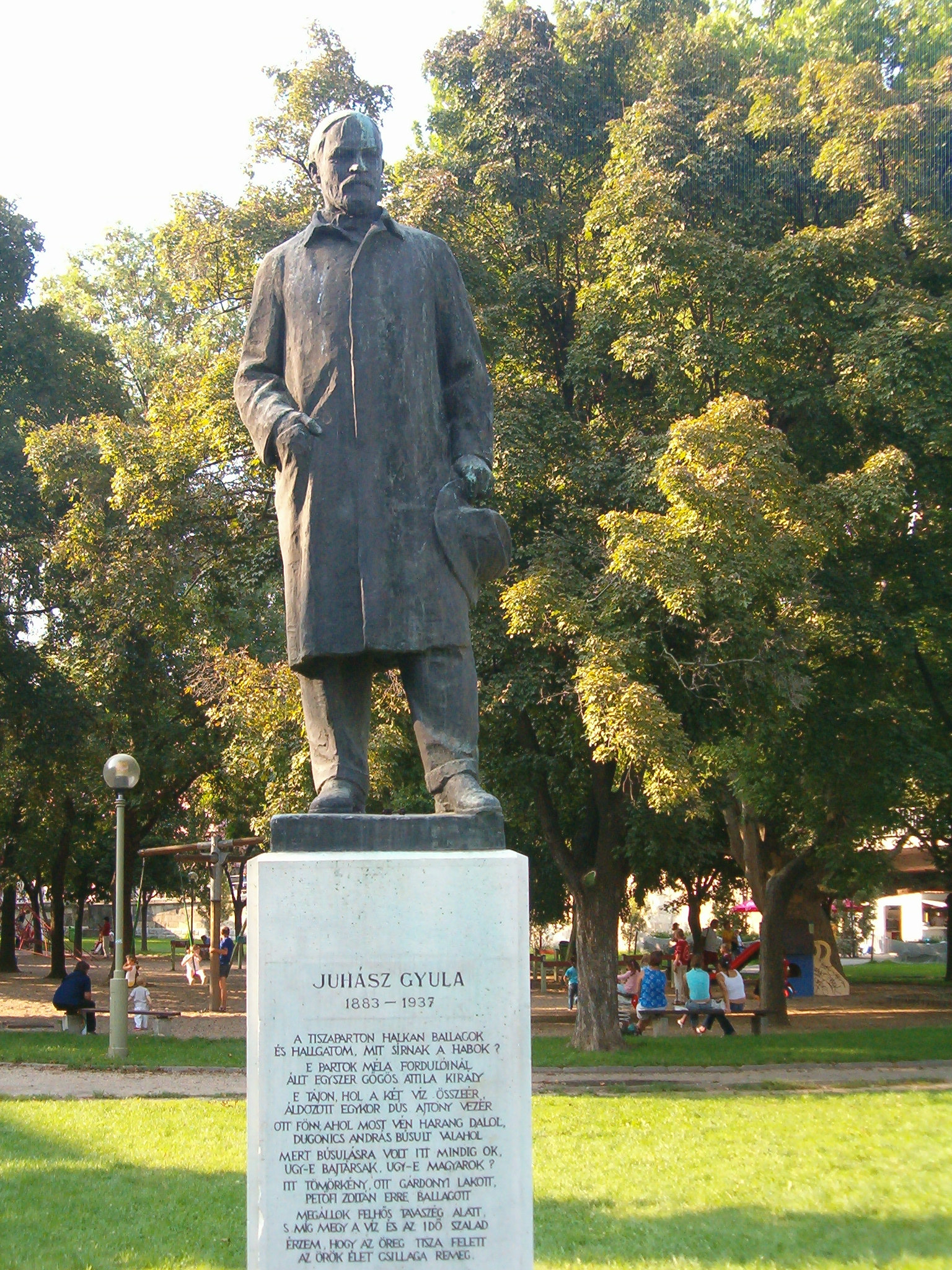 Juhász Gyula szobra Szegeden. Segesdi György alkotása 1957 // statue of poet Gyula JUHASZ in Szeged, Hungary. Sculptor: Segesdy György (1957) photo by uploader; 2005